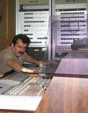 محمدرضا صابر (استودیو ۱۰۳ موسیقی صدا و سیما فروردین ۱۳۸۶)